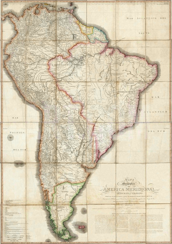 Carte de l'Amérique du sud (dite "méridionale") réalisée par le cartographe espagnol Juan de la Cruz Cano y Olmedilla en 1755